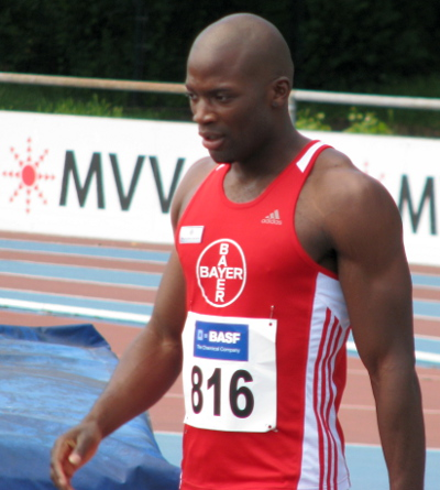 Aleixo-Platini Menga beim Olympia-Qualifikationswettkampf 2012 im Stadion der MTG Mannheim.